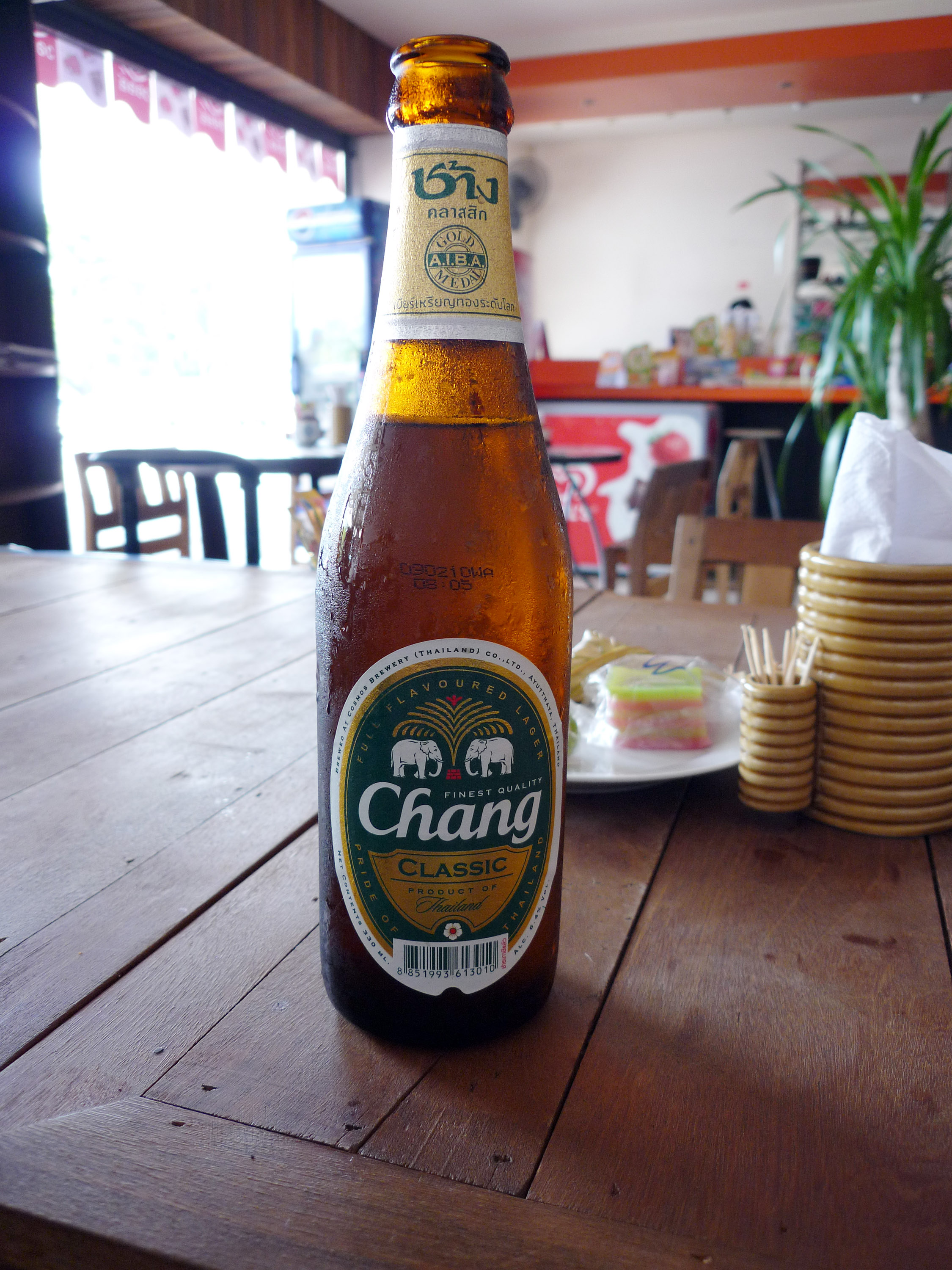 Chang Bier, Thailand